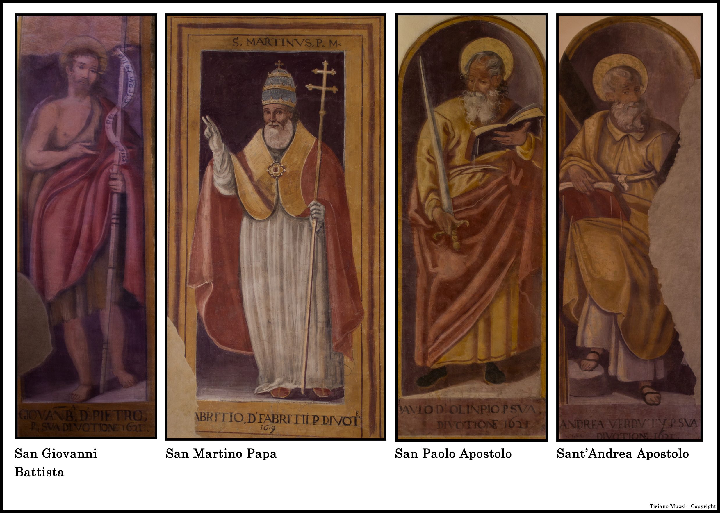 Lubriano, chiesa di San Giovanni Battista Decollato: gli affreschi seicenteschi di recente restaurati.